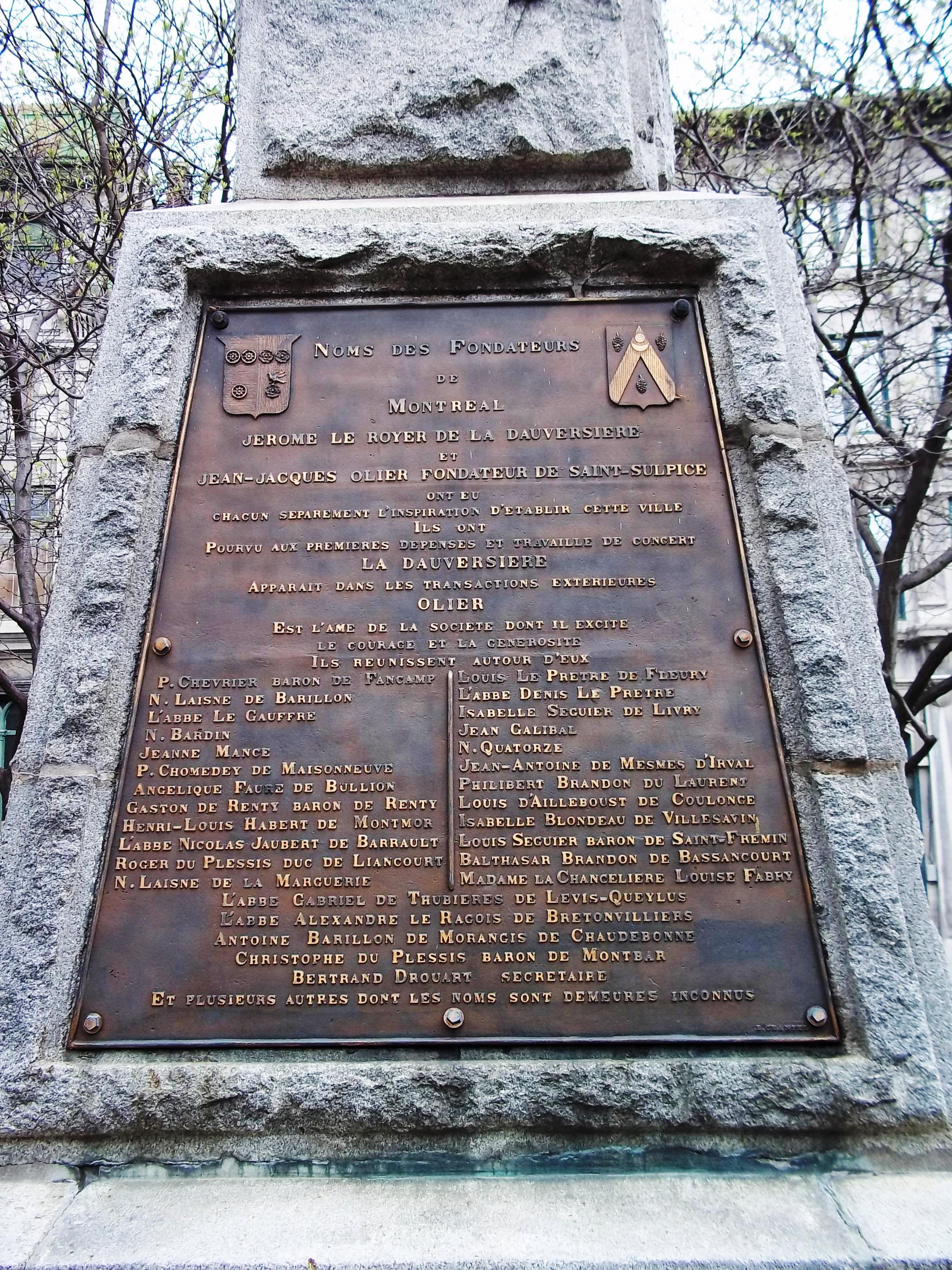 Monument aux pionniers, Place-la-Grande-Paix-de-Montréal